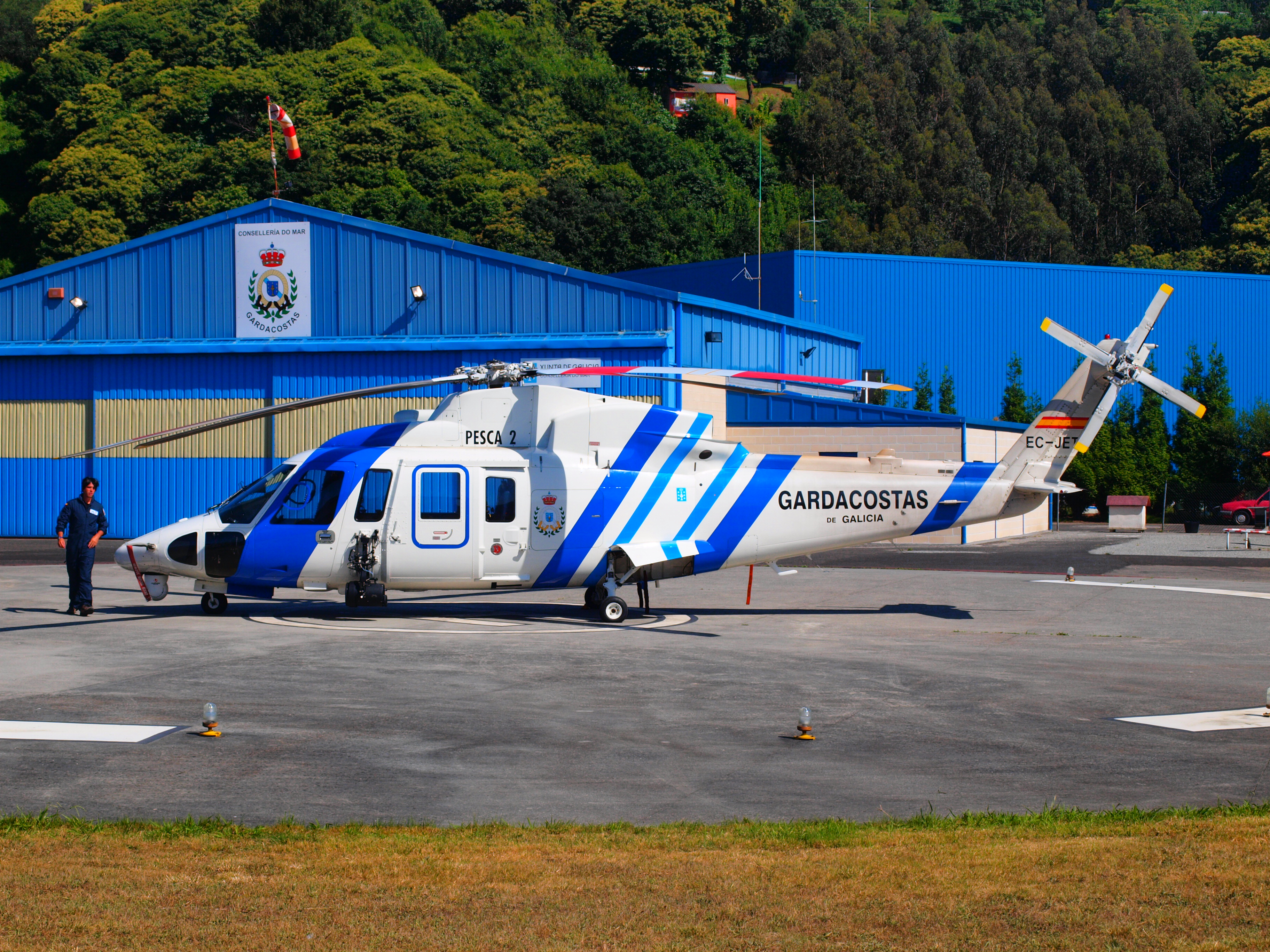 Julliet Echo Tango estacionado en la plataforma del Helipuerto Costa Norte (Codigo OACI: LEPV)